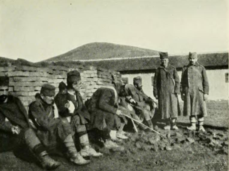 Soldados serbios heridos, en Pirot, durante la Primera Guerra Mundial.